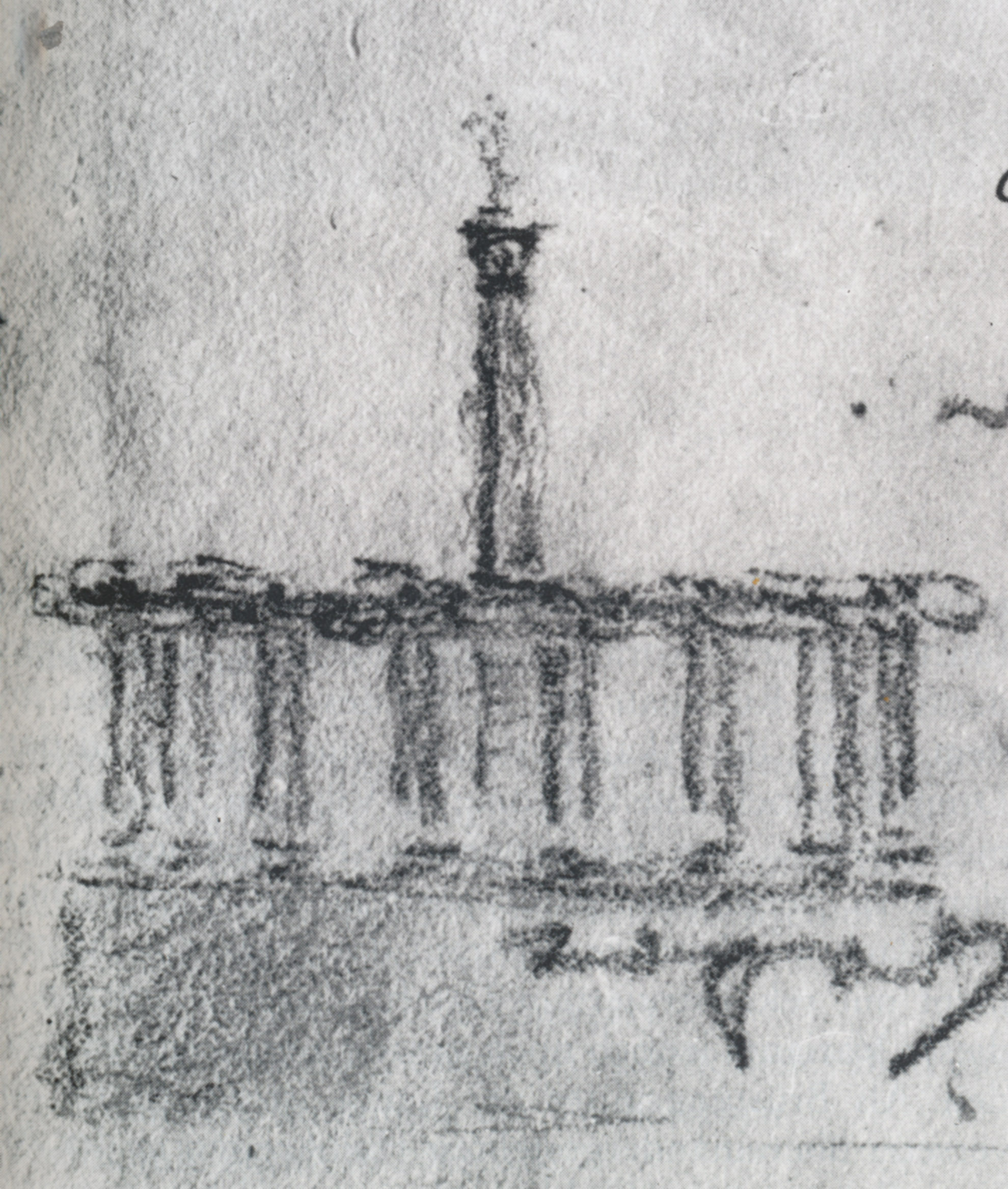 Erste Skizze des Kronprinzen zur Rotunde, 1835